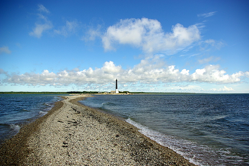 Vaade Sõrve säärelt majakale.